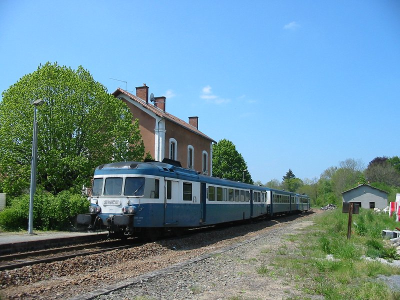 Composition d'autorails X 2800 à l'arrêt en gare de Nieul effectuant la liaison Poitiers - Limoges